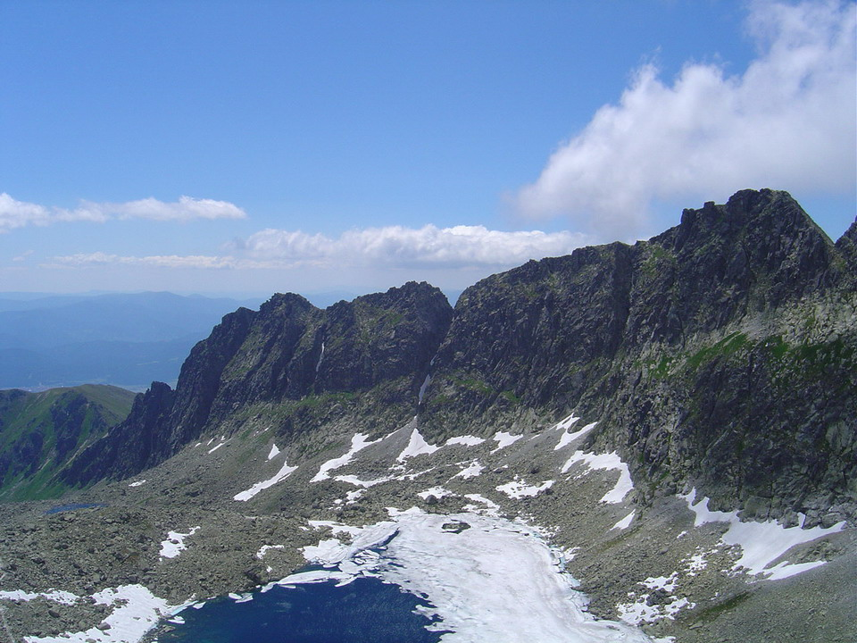 Ostra and Ostra veza from Furkotska dolina